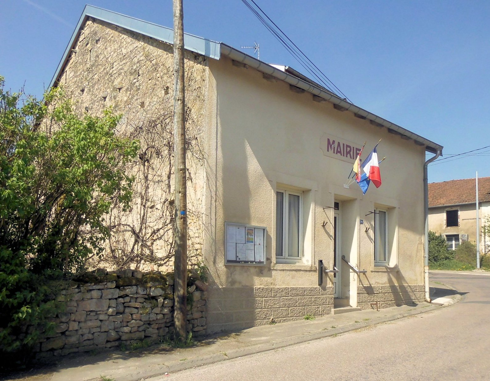 La mairie de Remicourt